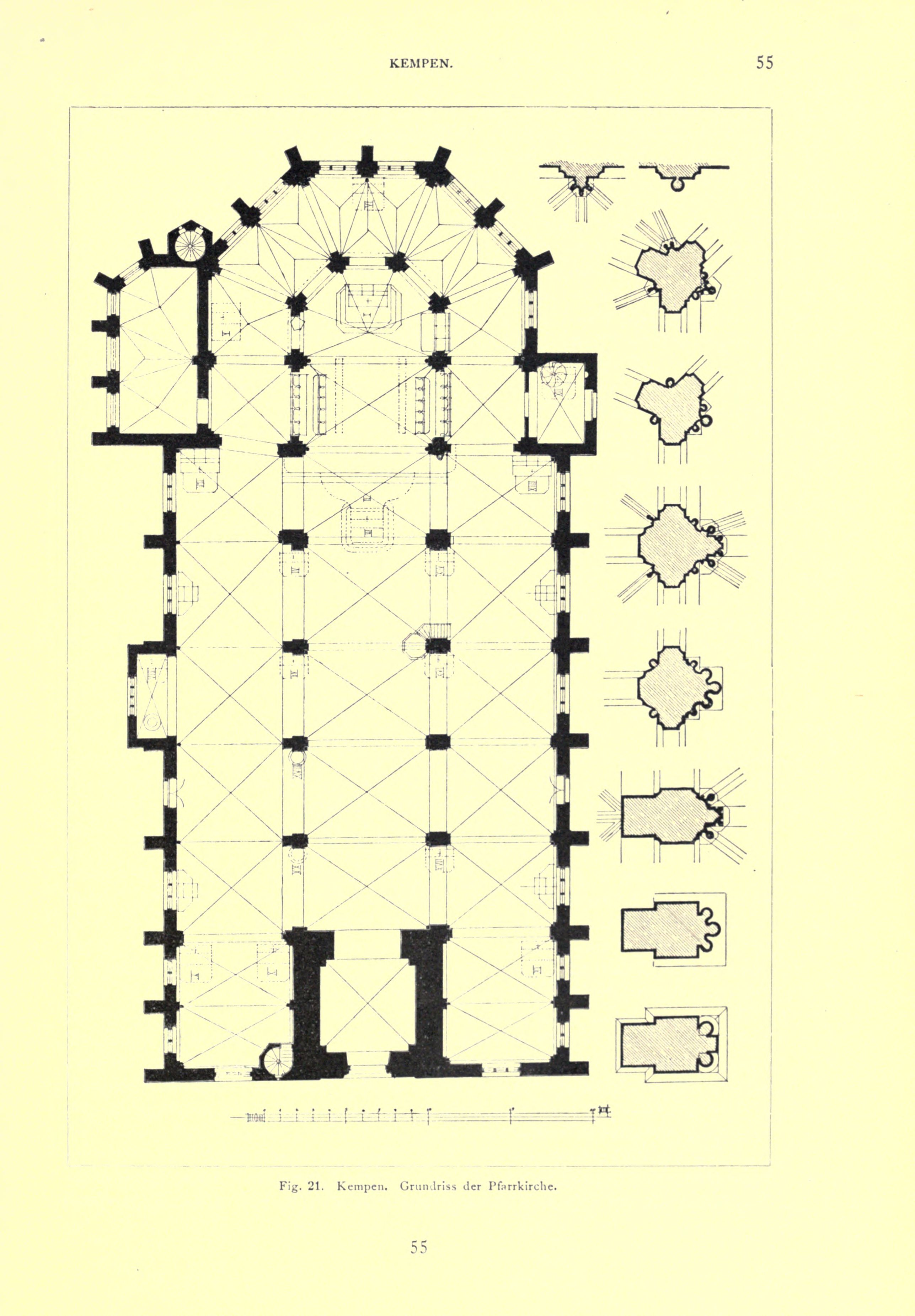 Die Kunstdenkmäler der Rheinprovinz - Band 1